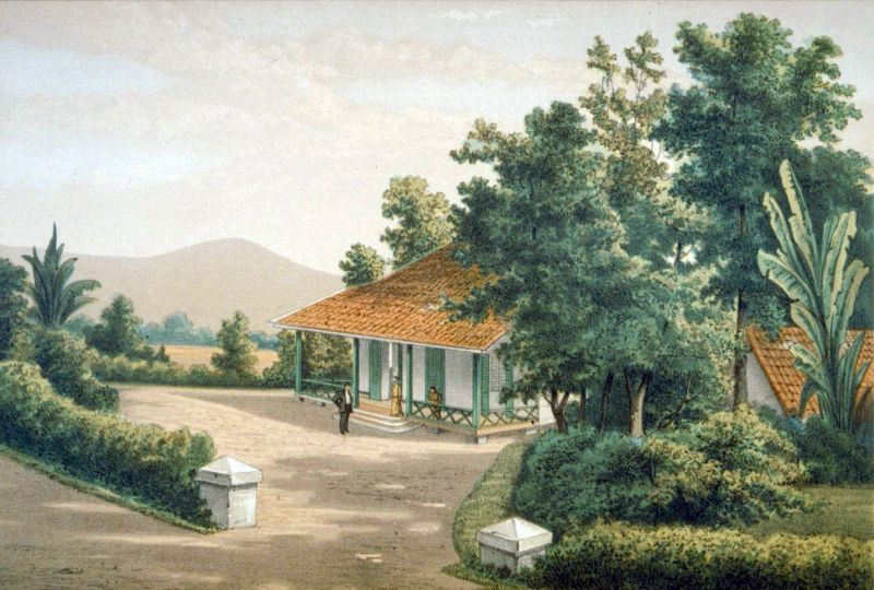 Litho. Litho naar een oorspronkelijke aquarel van J.C. Rappard.. Controleurswoning